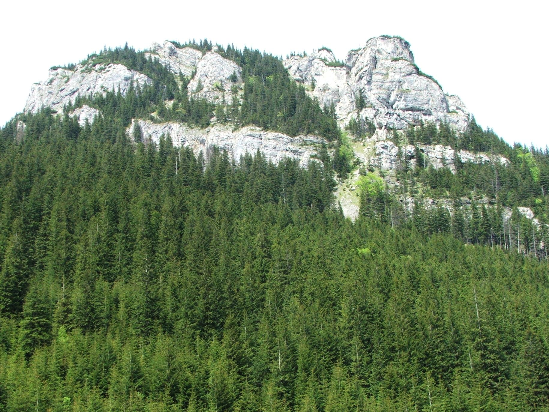 Stoły - widok z Polany Pisana (Dolina Kościeliska)